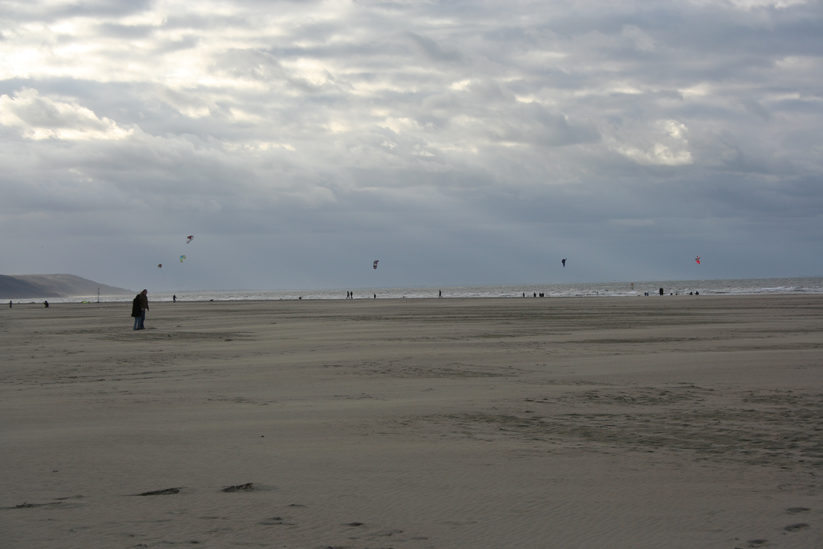 Die sandstrand van Deauville.